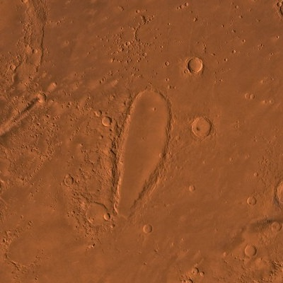 Zoom sur la formation Martienne Orcus Patera Photographie prise par la sonde Viking Orbiter 1